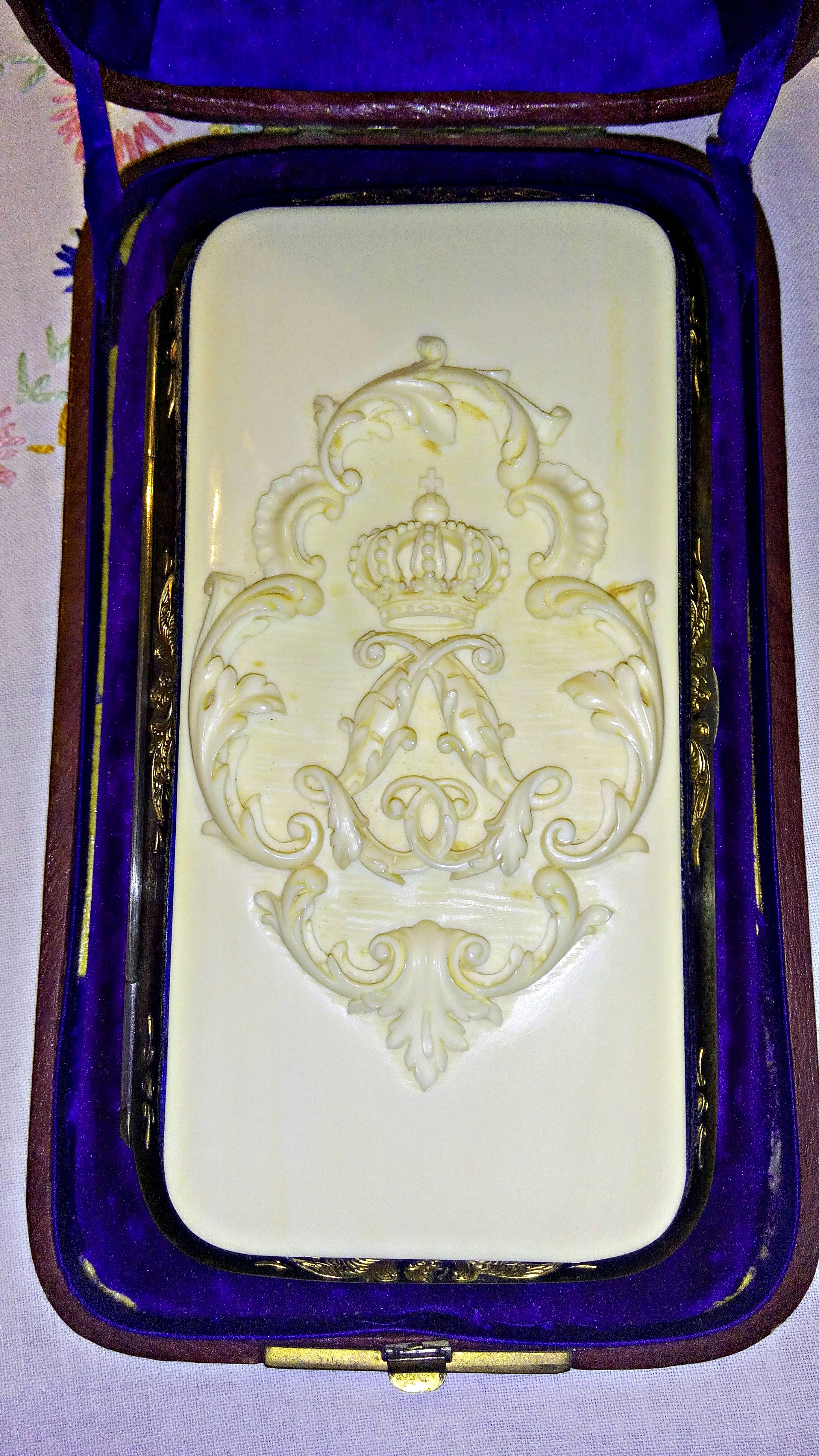 Elfenbein Zigarrenetui. Persönliches Geschenk König Ludwig II. von Bayern an den Hofschauspieler Emil Rohde. (Im Besitz unserer Familie, da meine Urgroßtante Anna Langmantl, den Haushalt Rohdes führte und das Etui nach seinem Tod als Geschenk erhielt.) Gefertigt von Anton Diessl München (1837-1918).